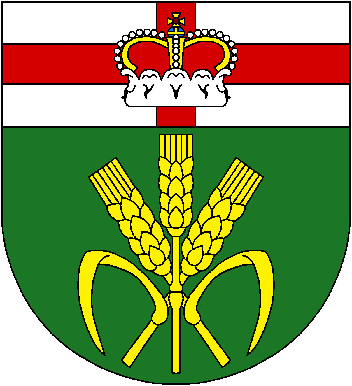 znak obce Úpohlavy